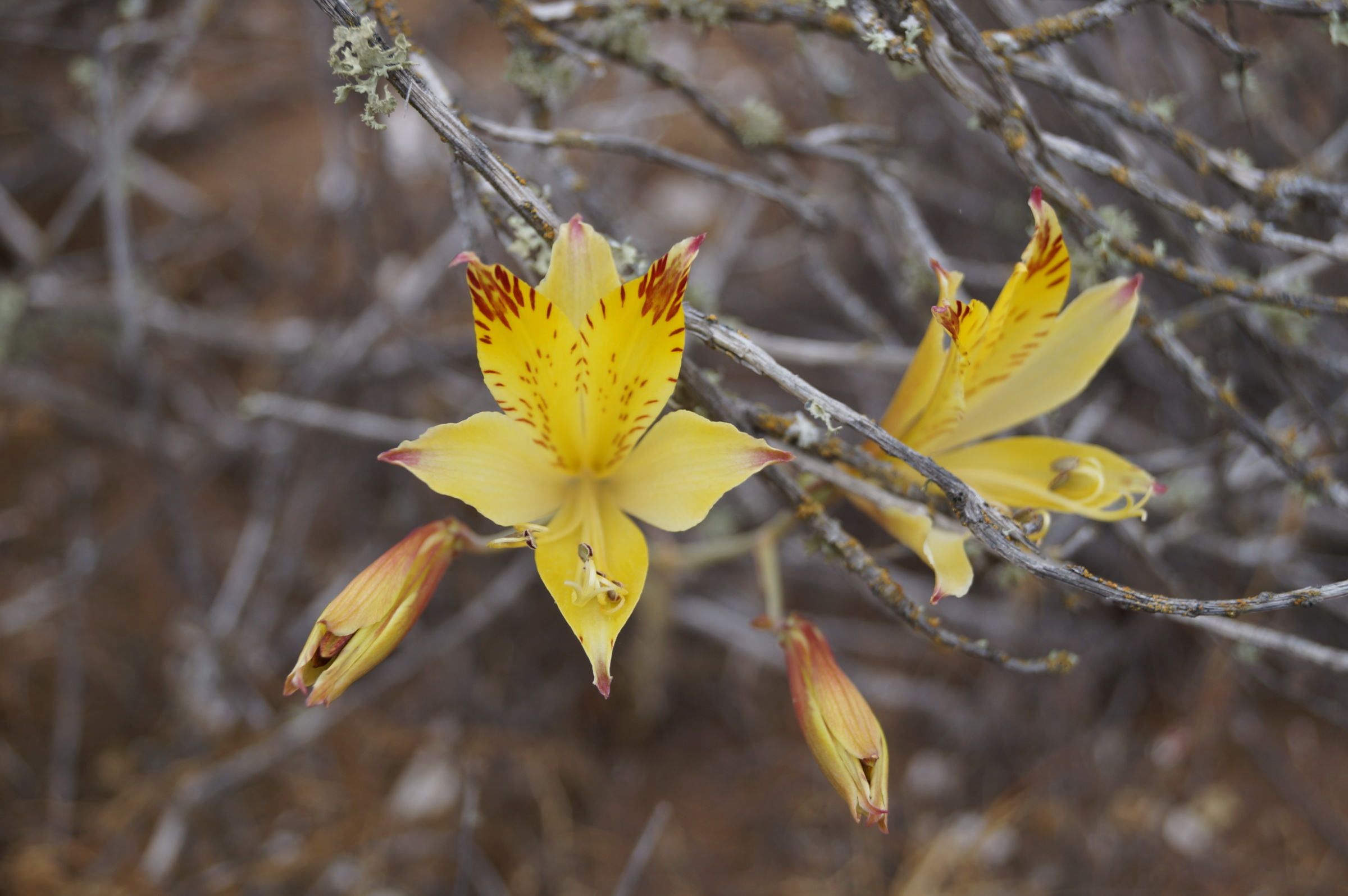 Guanaqueros, region de Coquimbo